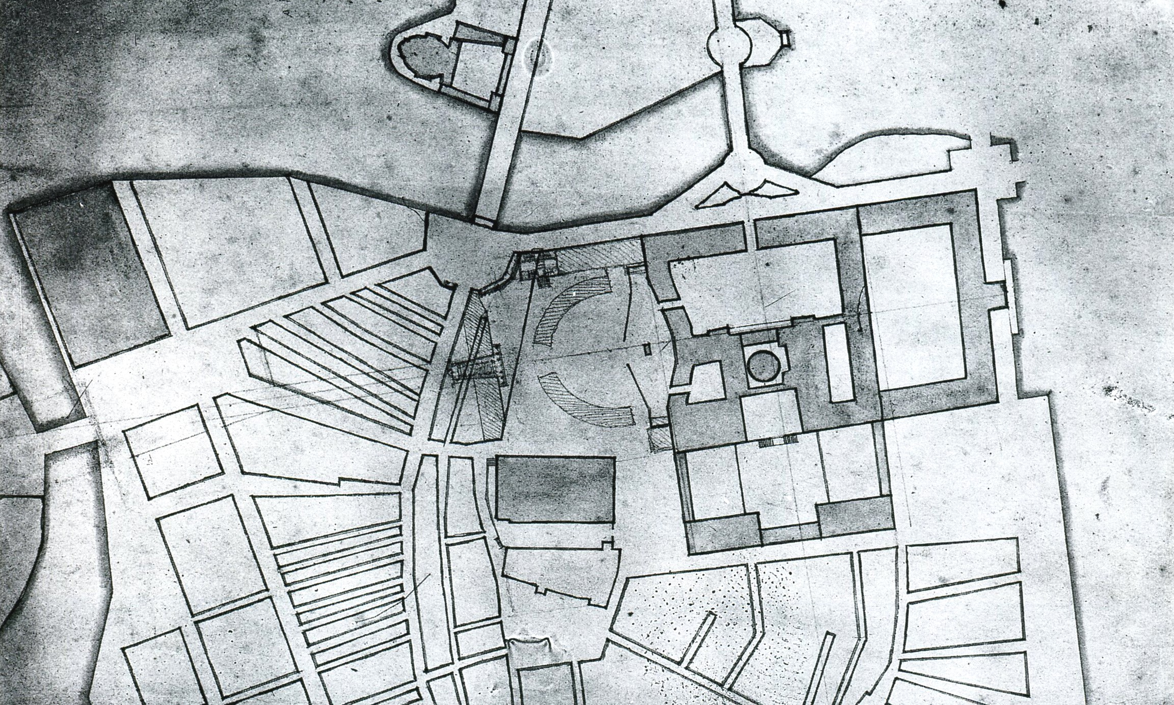 Norra delen av Stadsholmen med Jean de la Vallés ombyggnad av slottet och kompletteringar (med blyerts) av Nicodemus Tessin d.y.